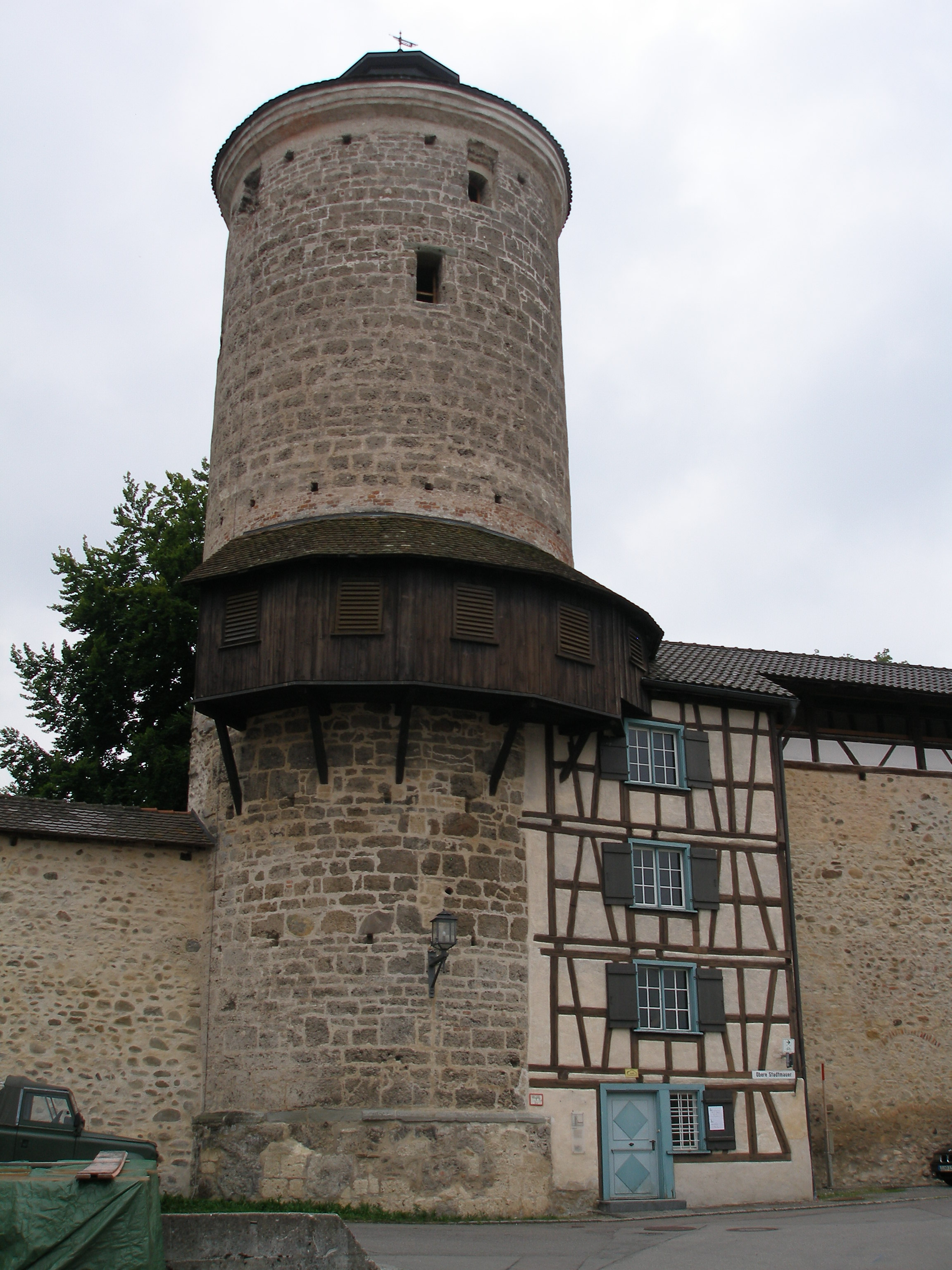 Stadtmauer Isny